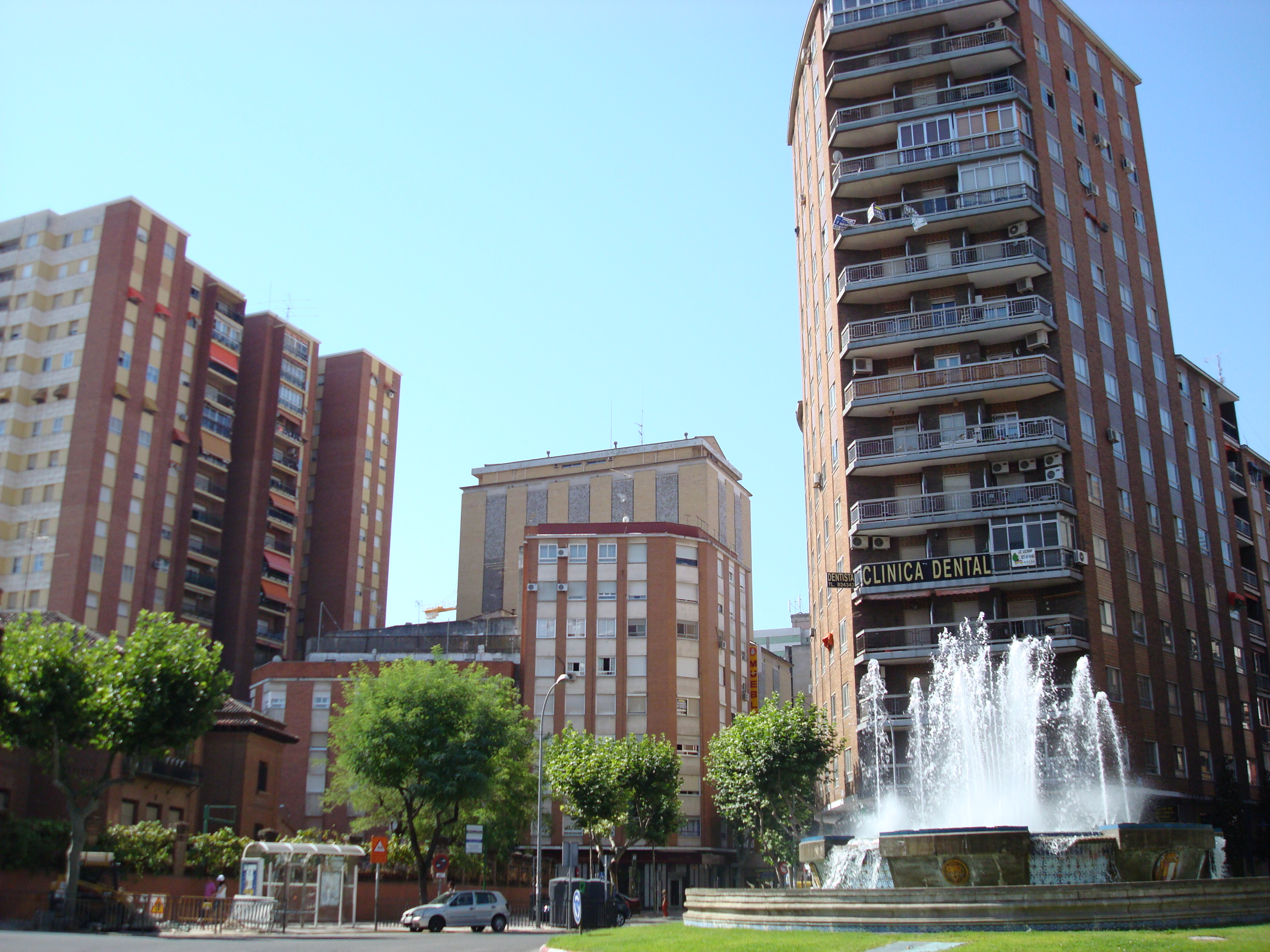 Spain Square at Talavera de la Reina.